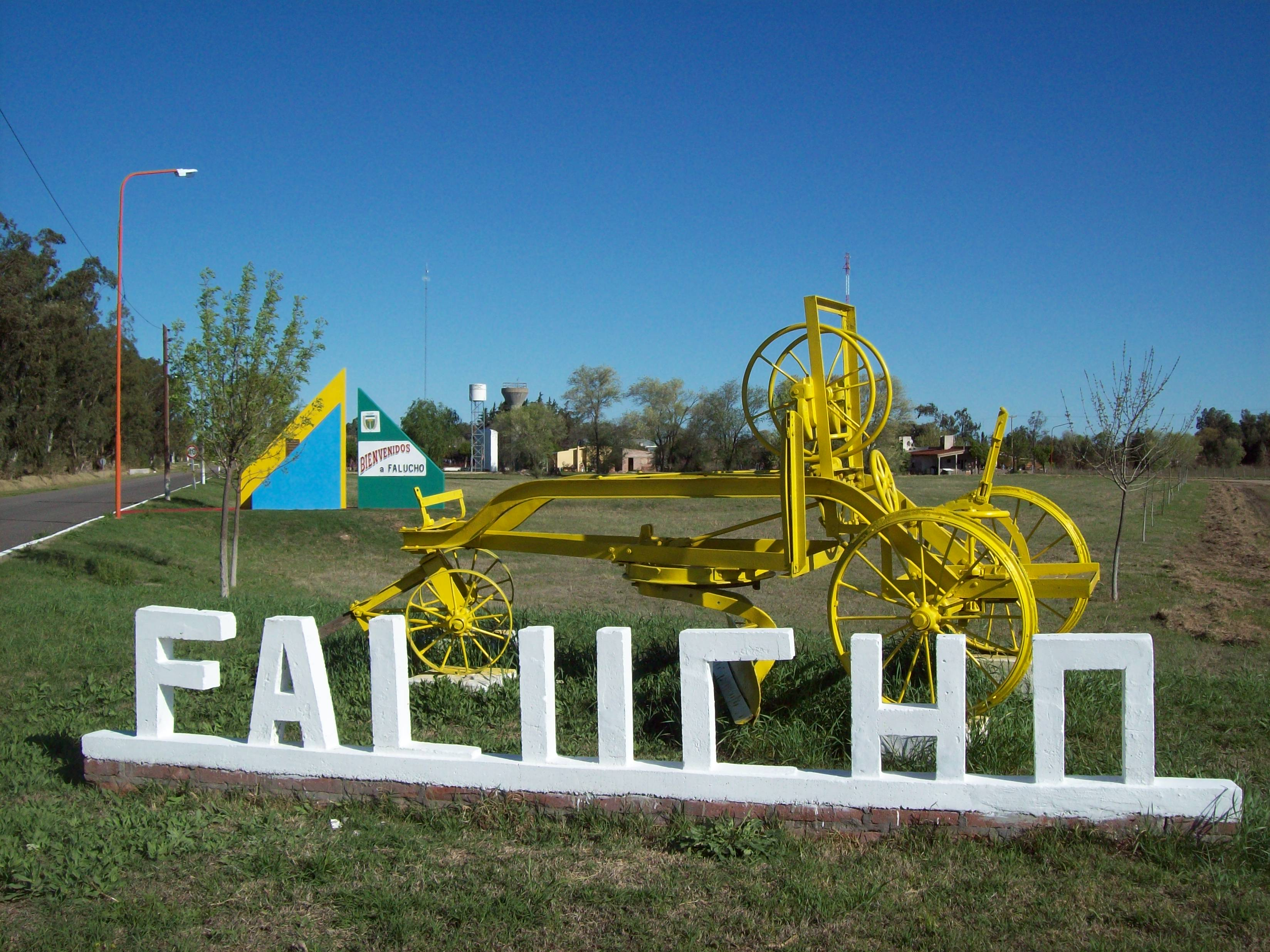 INGRESO A LA LOCALIDAD